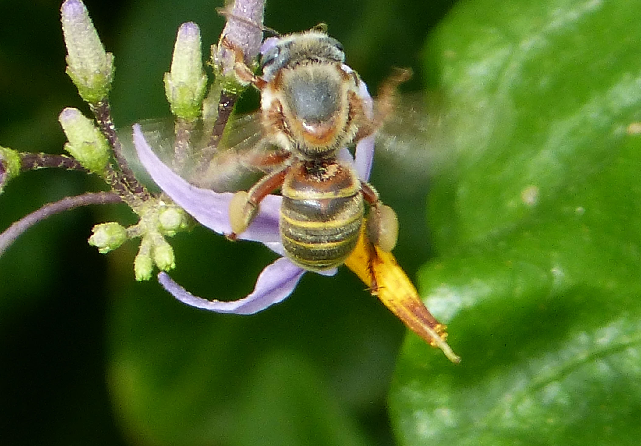 Cayo Coco, Cuba